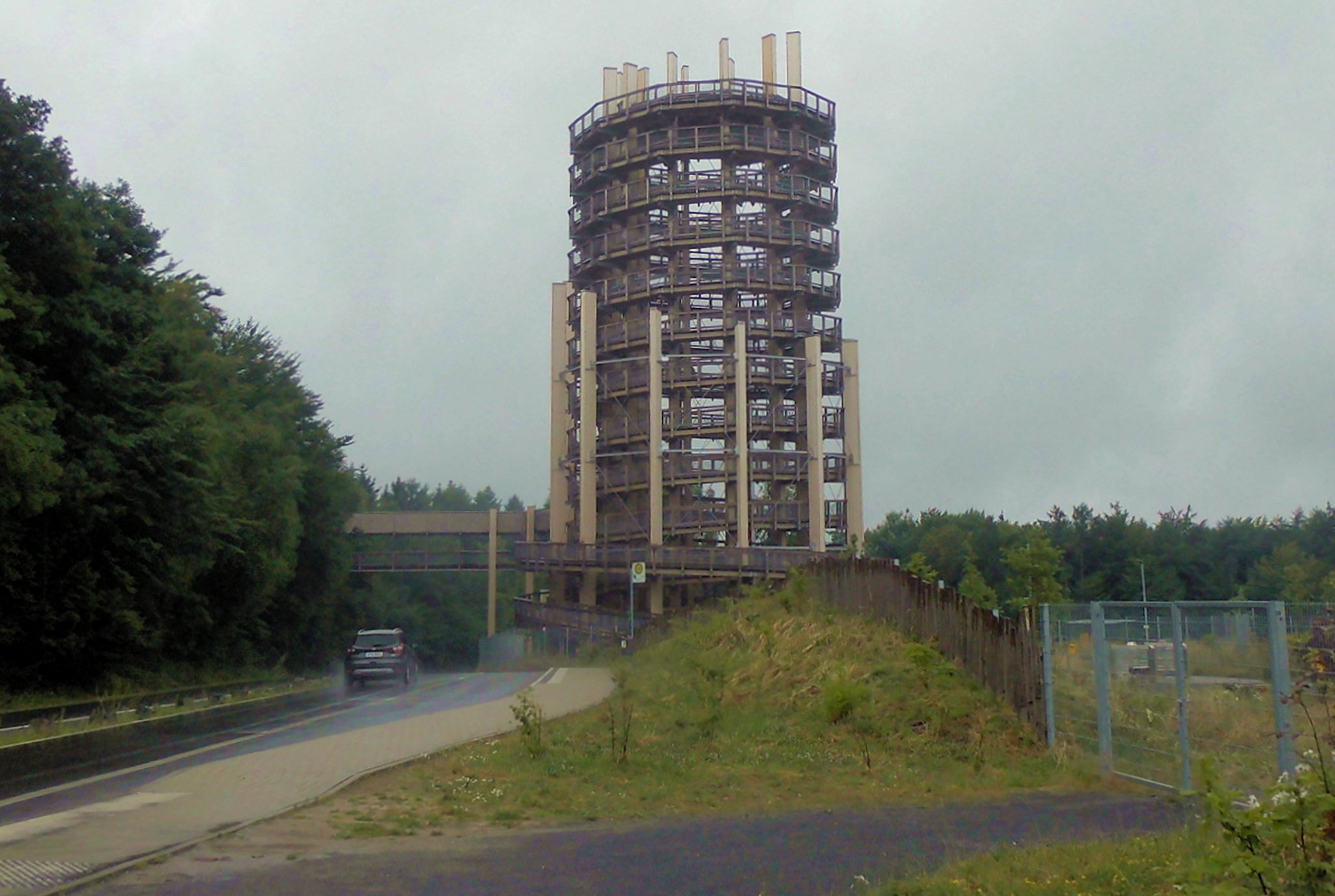 Aussichtsturm des Panarbora-Parks in Waldbröl, Deutschland